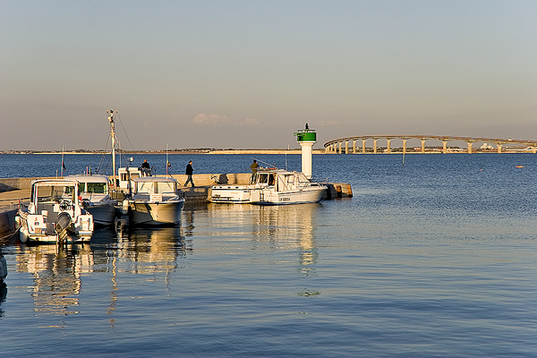 Le port après sa transformation en 2007 - Rivedoux Plage - Île de Ré